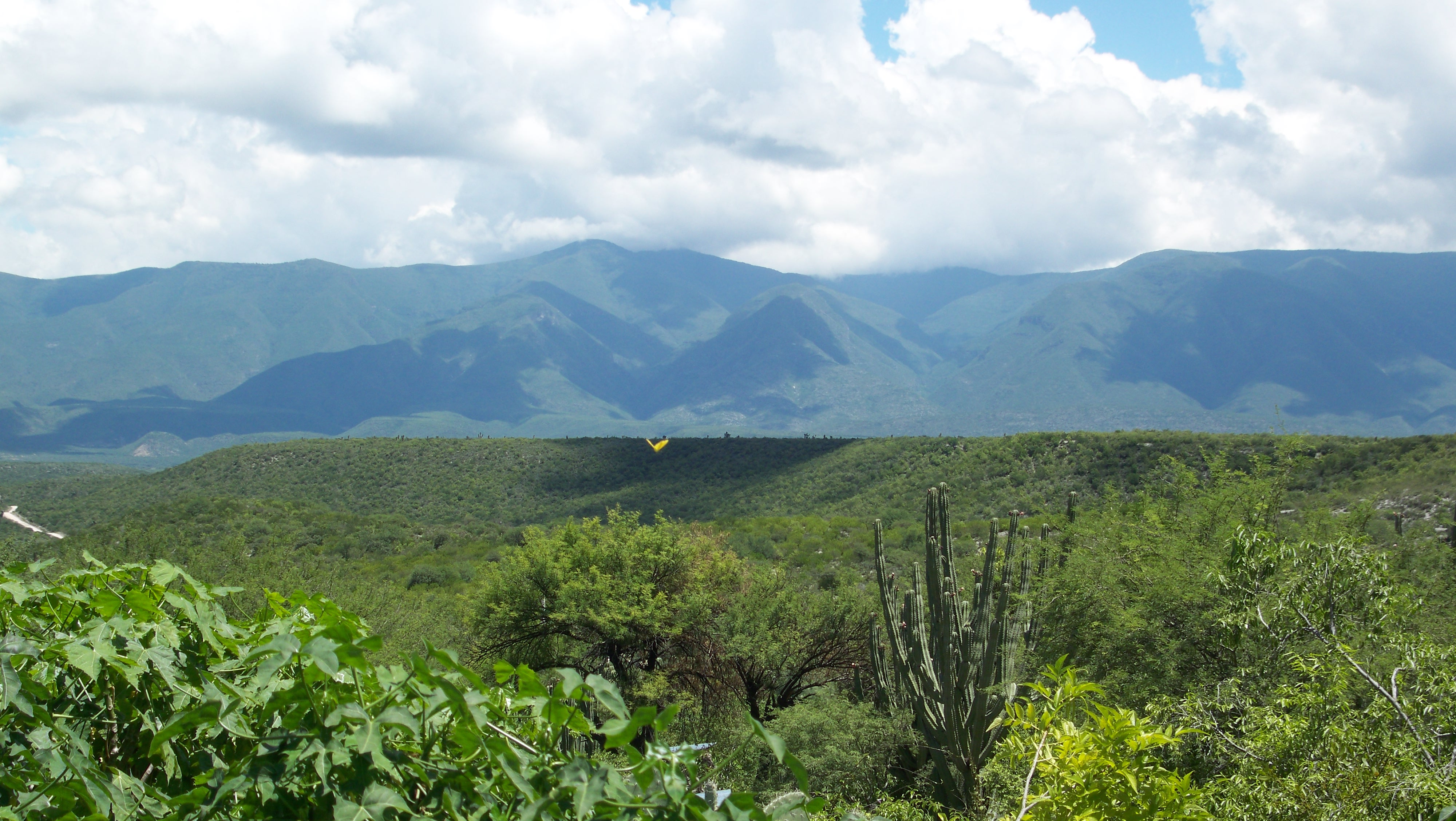 Una vista panorámica hacia la Sierra Madre Oriental - La Independencia, Jaumave, Tam.